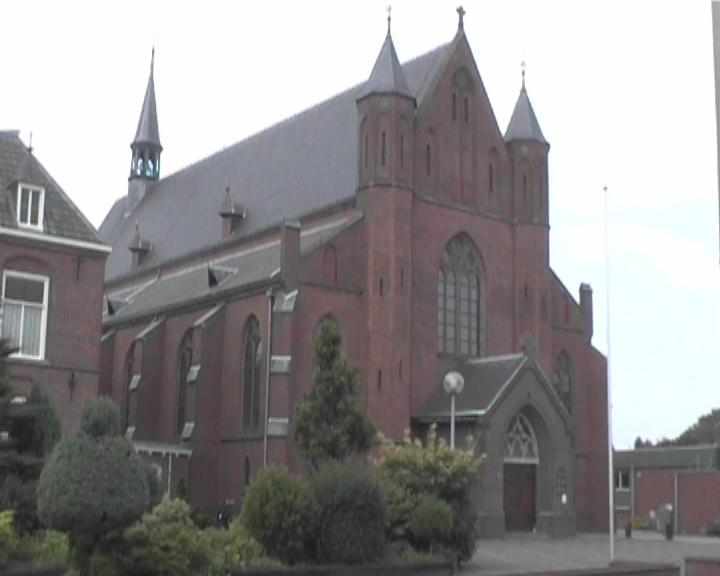 Eigen Opname Officiële website